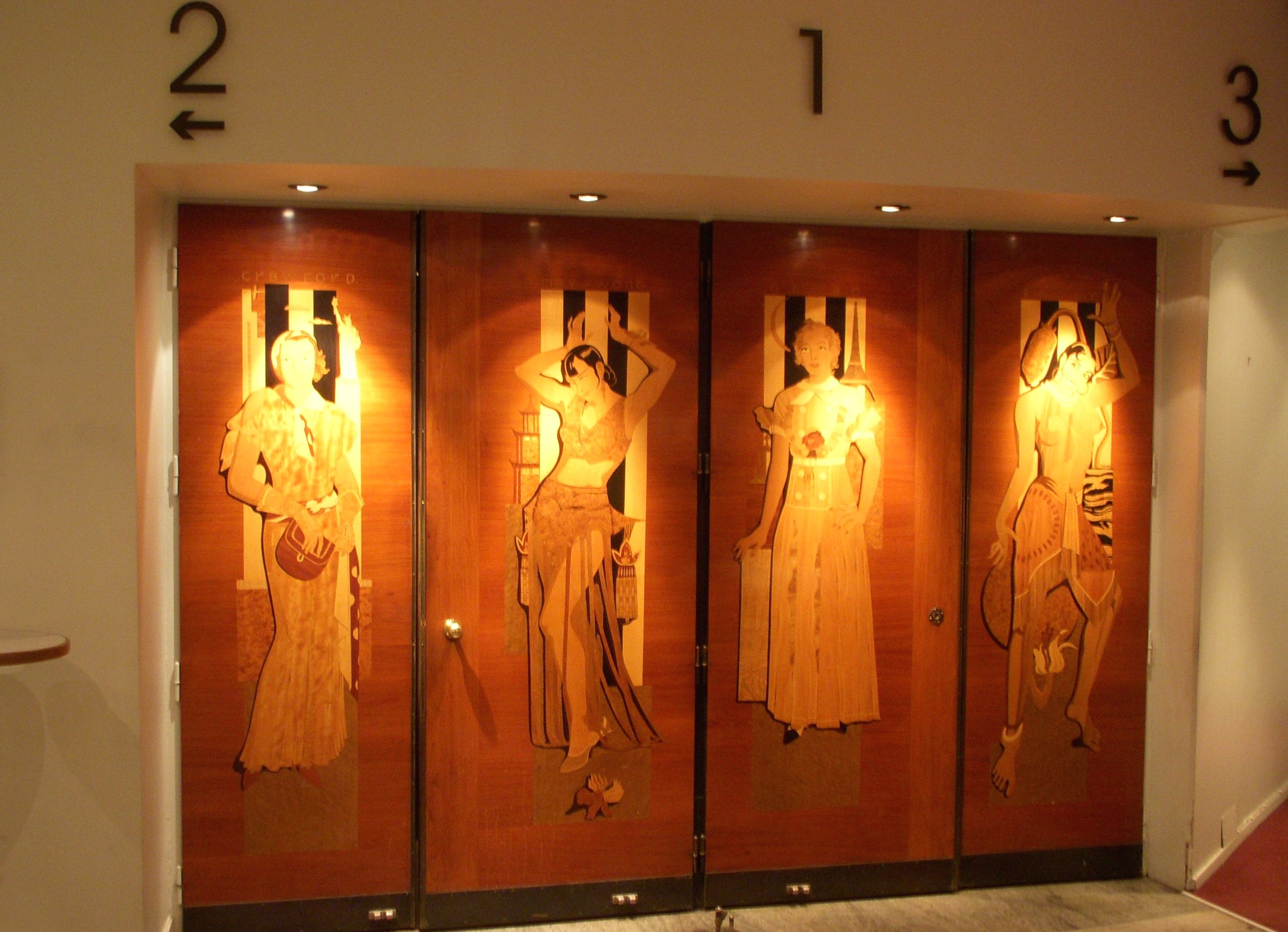 Biografen "Grand" i Stockholm, intarsiaarbeten visnade (fr.vä.): Joan Crawford för Amerika, Anna May Wong för Asien, Greta Garbo för Europa och en lättklädd Josephine Baker representerade Afrika.